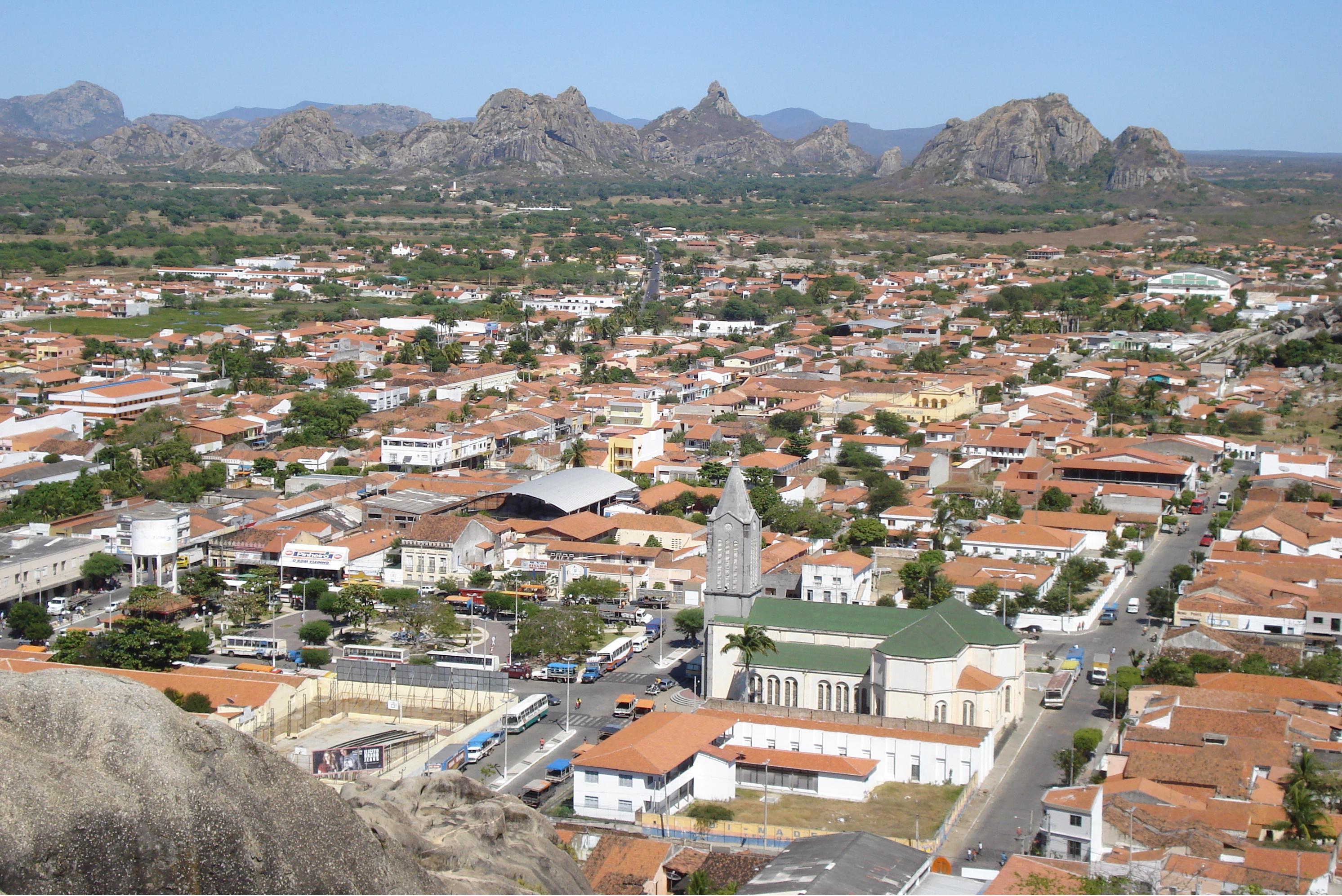 Vista parcial da cidade de Quixadá no estado do Ceará - Brasil.